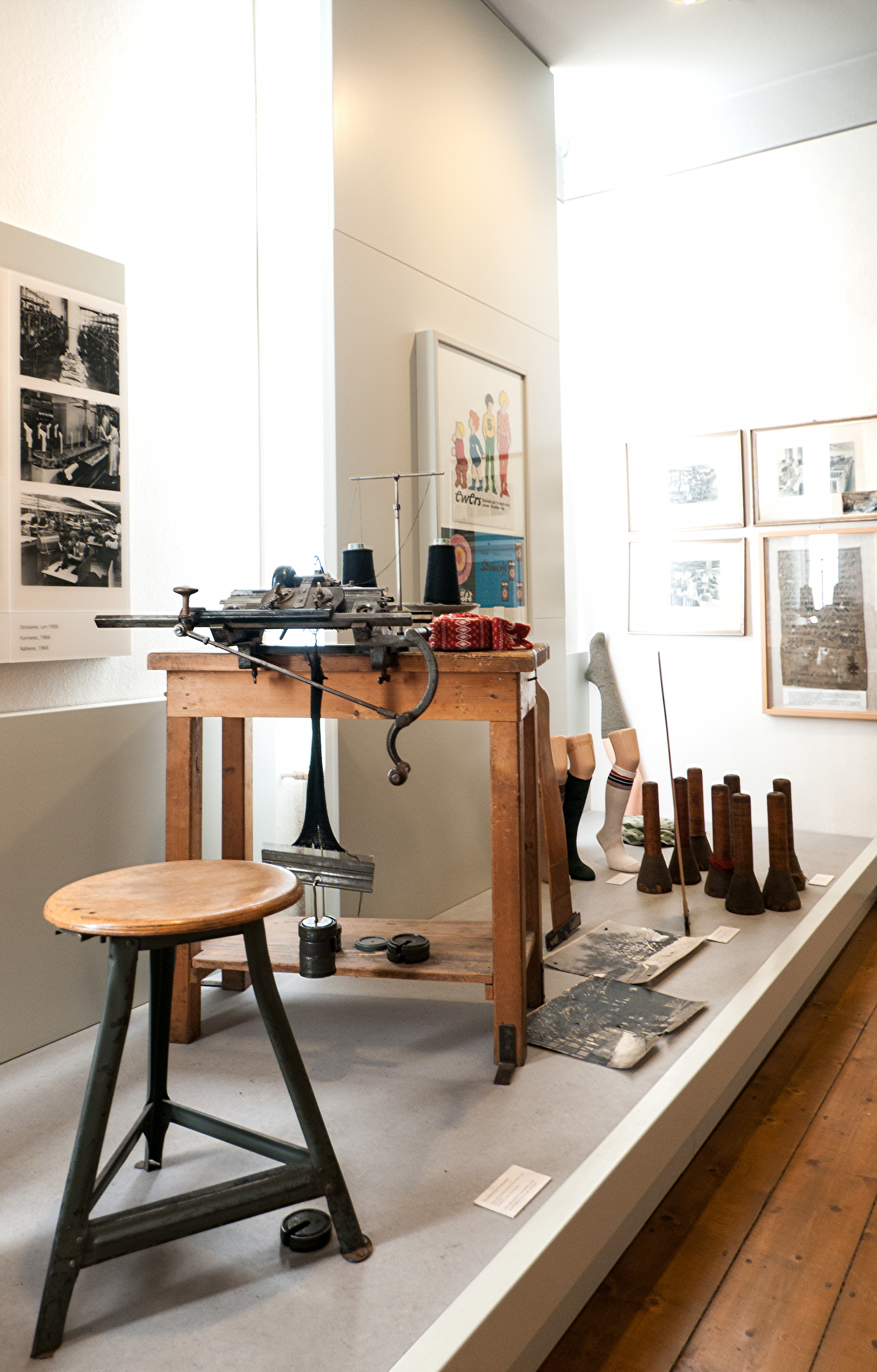 Heimatmuseum Medebach: historische Strickmaschine Fa. Falke